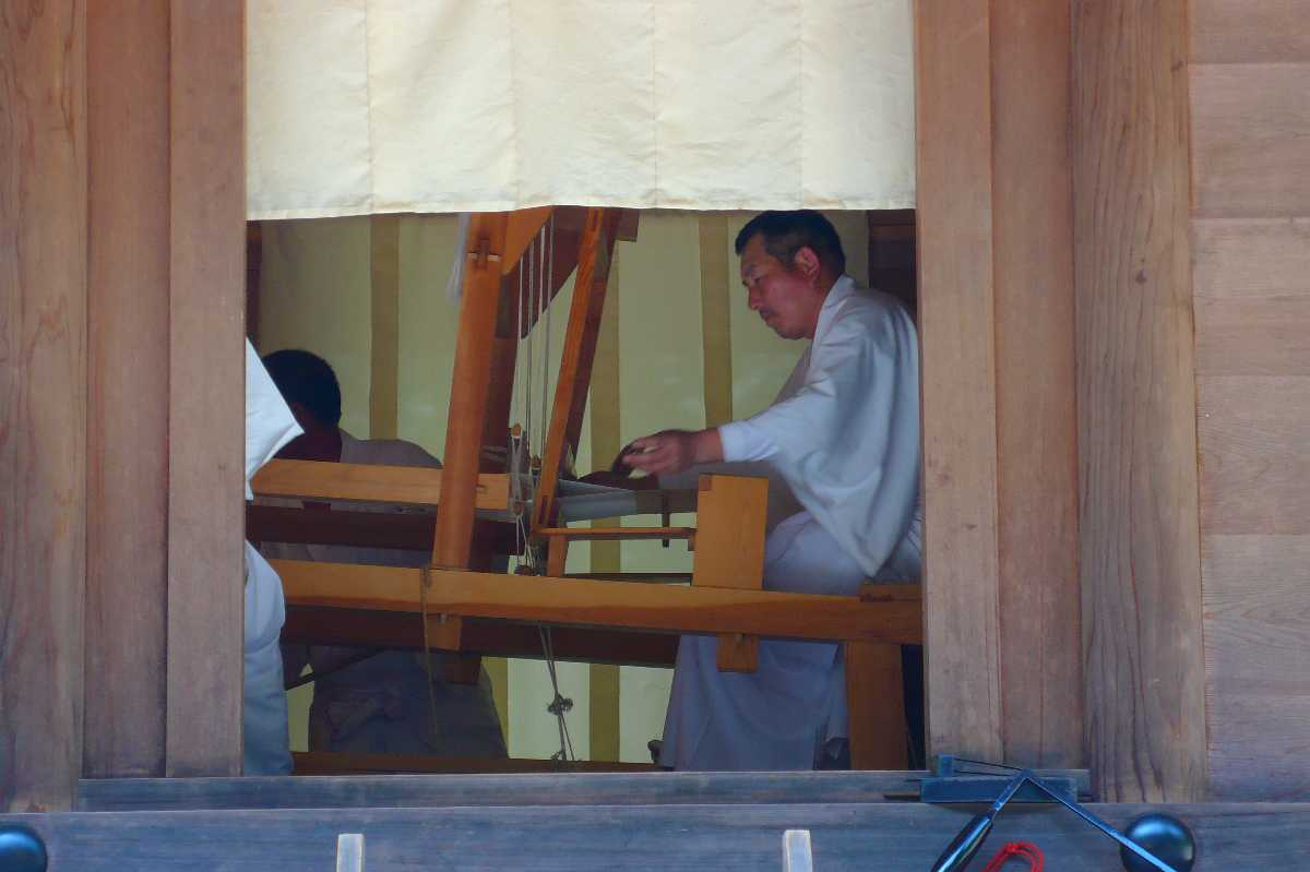 Weaving at Kan-omi-hatadono-jinja